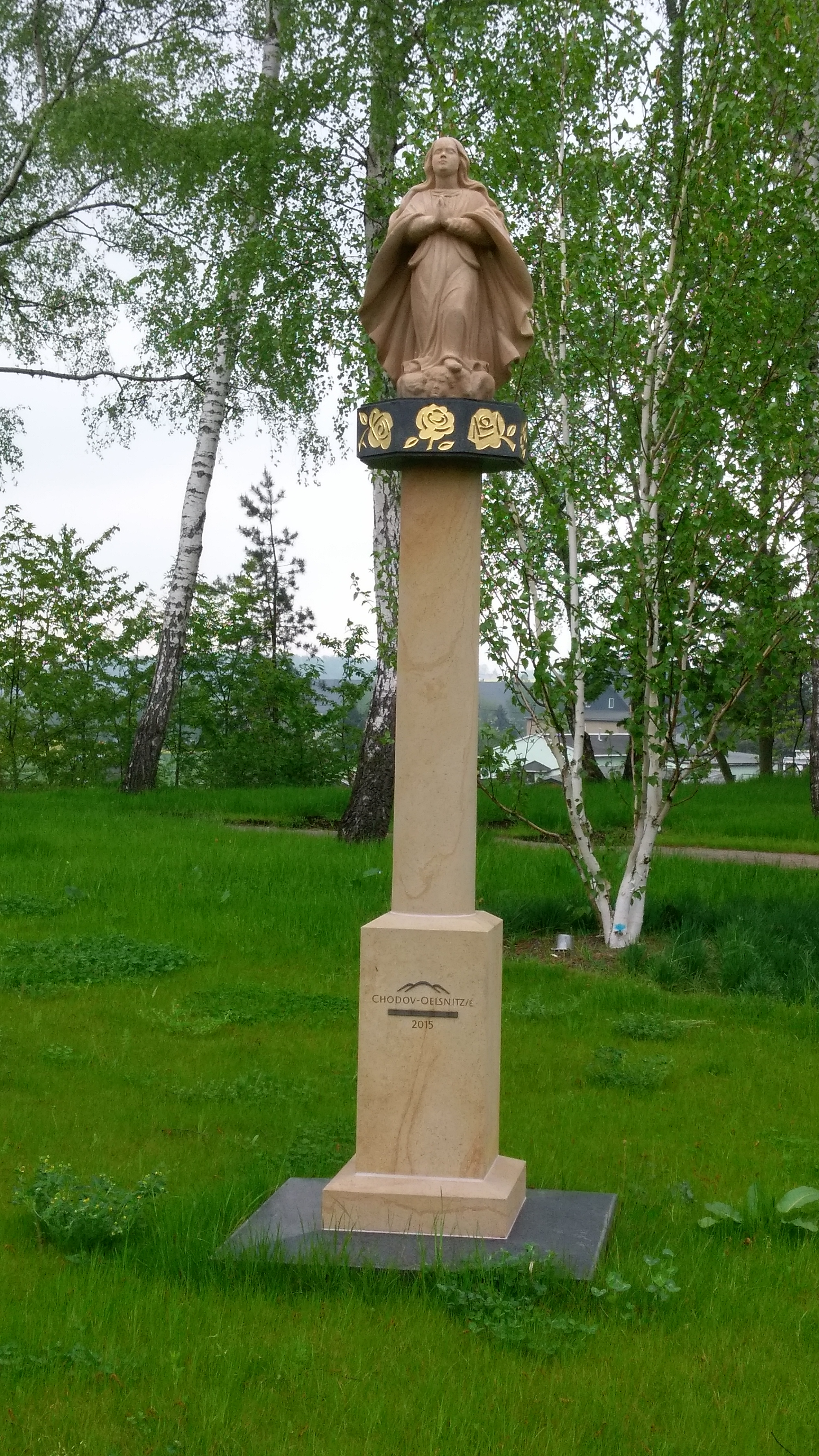 Die Mariensäule aus dem Jahr 2015 wurde im Rahmen der Landesgartenschau Oelsnitz/Erzgeb. 2015 eingeweiht. Sie wurde durch den Künstler Klaus Hirsch entworfen. Die schlichte Sandsteinsäule steht auf einem quadratischen Sockel. Das massive Kapitell aus schwarzem Marmor ist mit vergoldeten stilisierten Rosen verziert. Die Marienfigur, eine barhäuptige Statue der Jungfrau Maria, den Kopf leicht nach hinten geneigt, mit zum Gebet gefalteten Händen, ist eine Replik der Marienstatue in Chodov, der Partnerstadt von Oelsnitz im Erzgebirge.